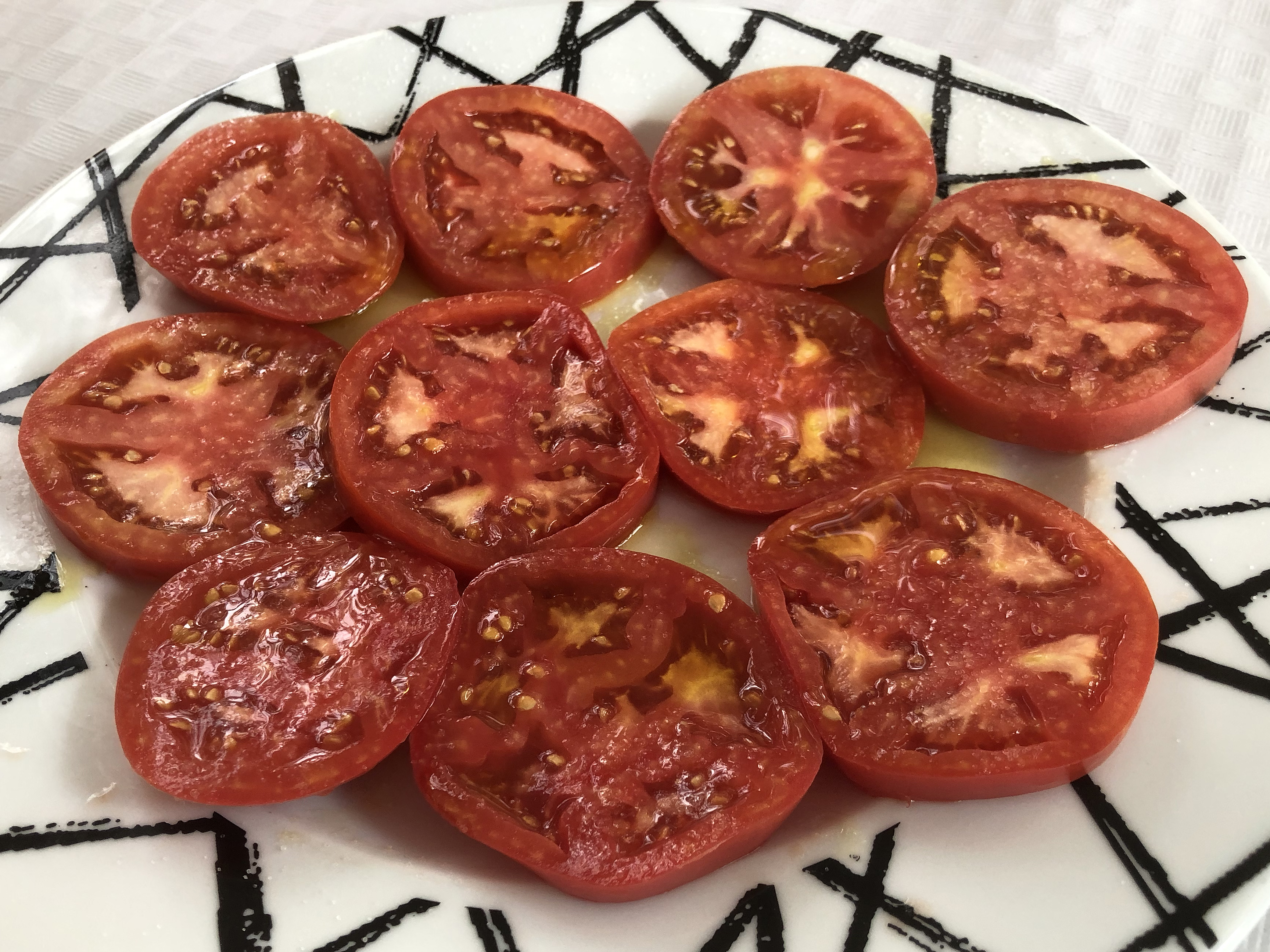 Tomates Miranda de Ebro